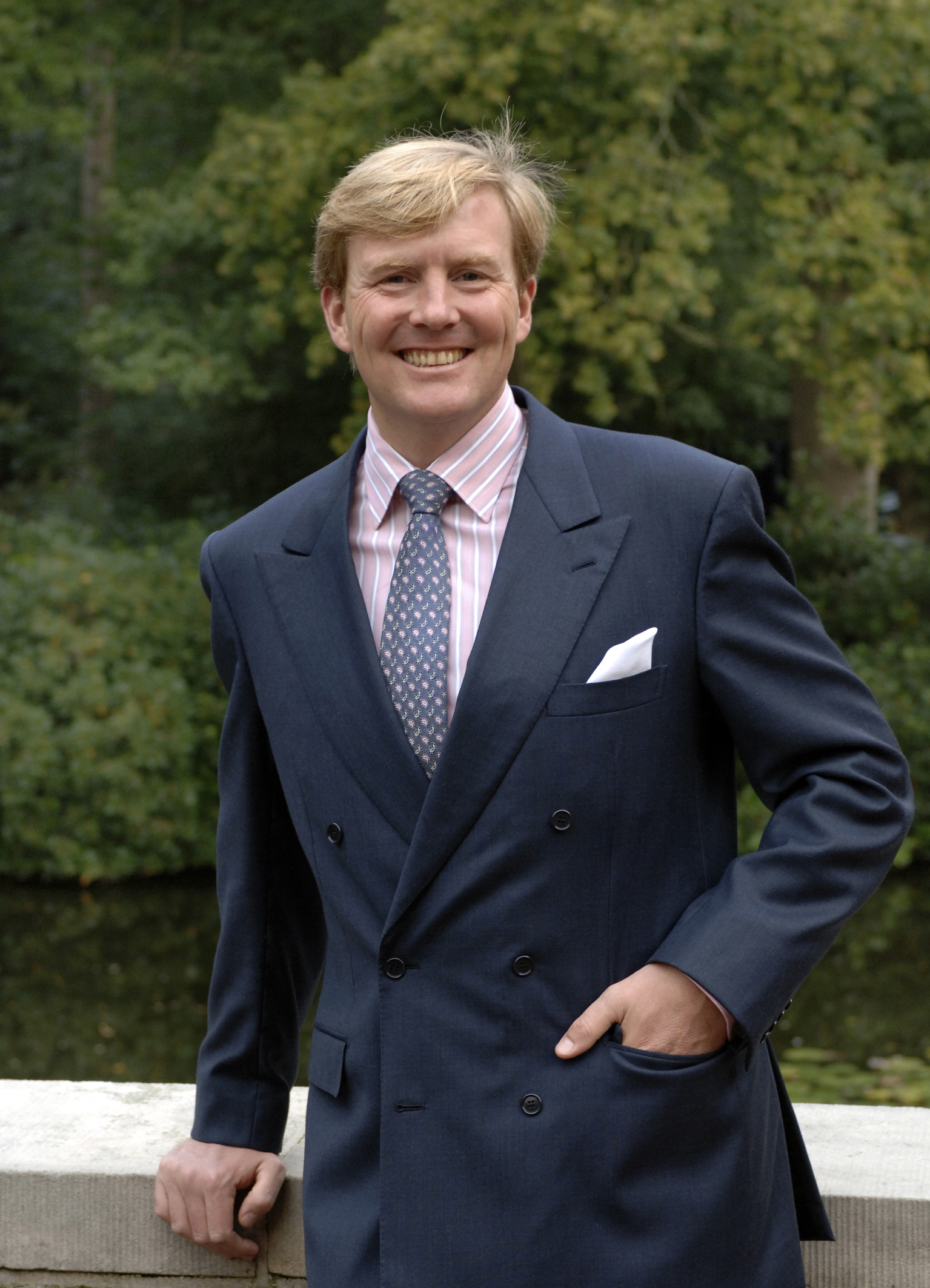 De Prins van Oranje, oktober 2006.